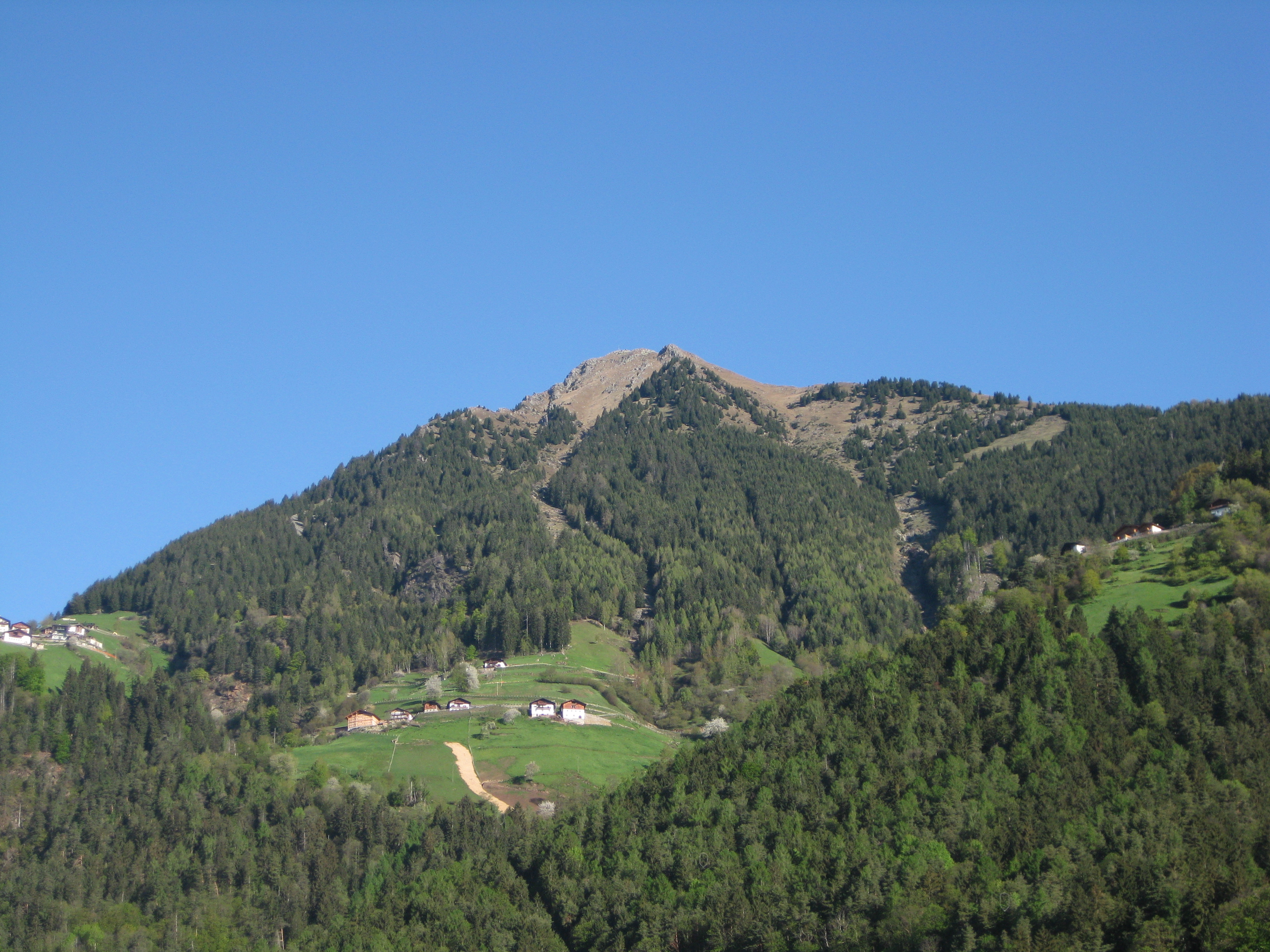 Die Mutspitze von Dorf Tirol aus gesehen, an den Hängen darunter die Muthöfe